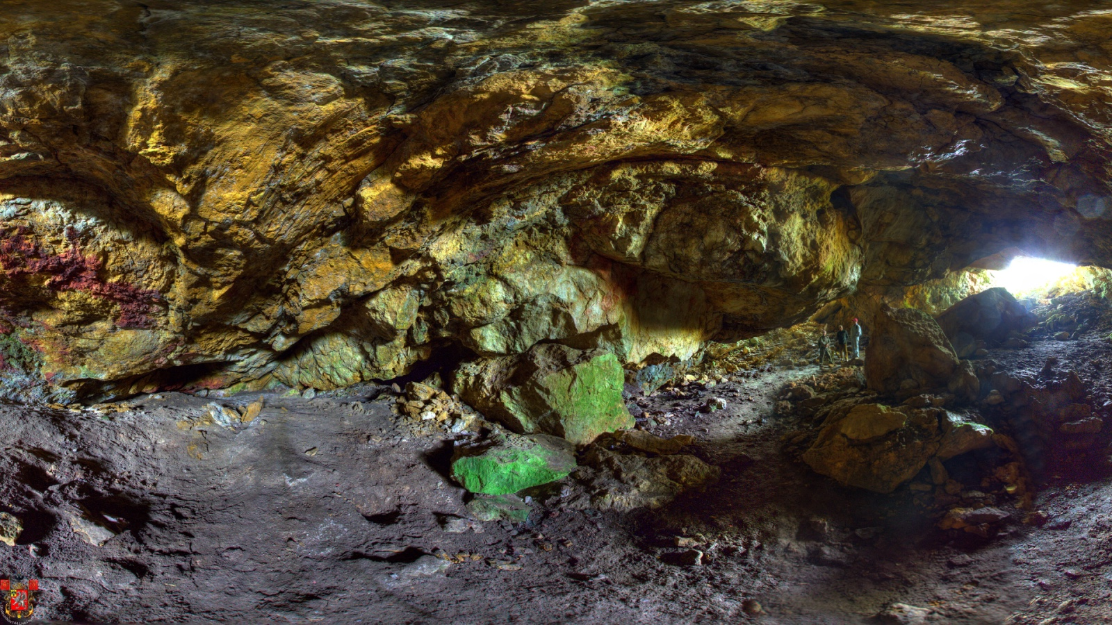 Пещера Сюндюрлю